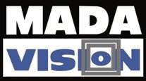 madavision